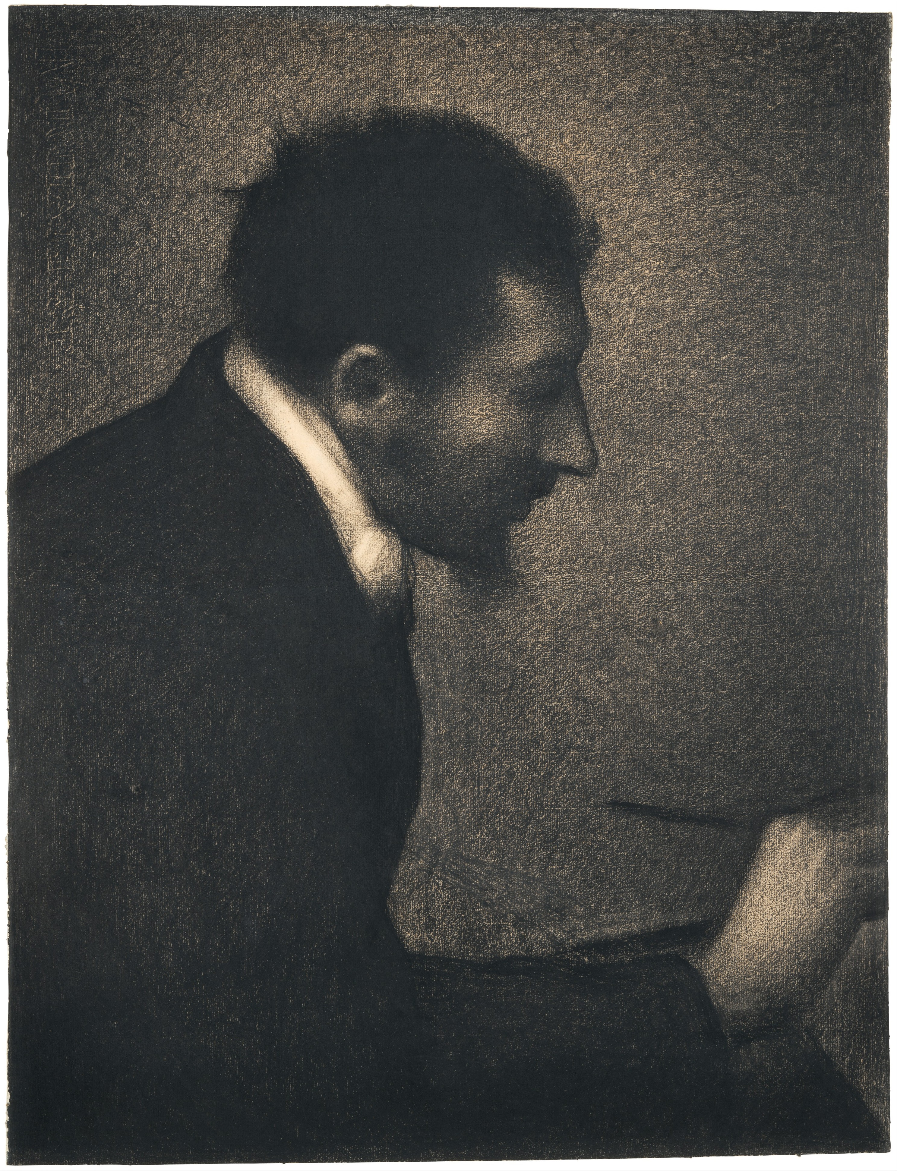 Portrait d'Aman-Jean (1860–1936) en train de peindre, par son ami Georges Seurat